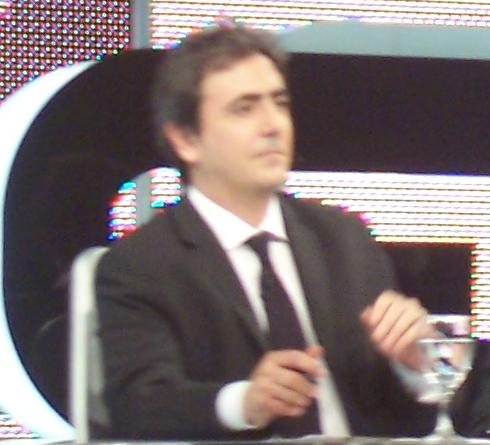 Eduardo de la Puente en Caiga Quien Caiga (Telefé-Argentina)